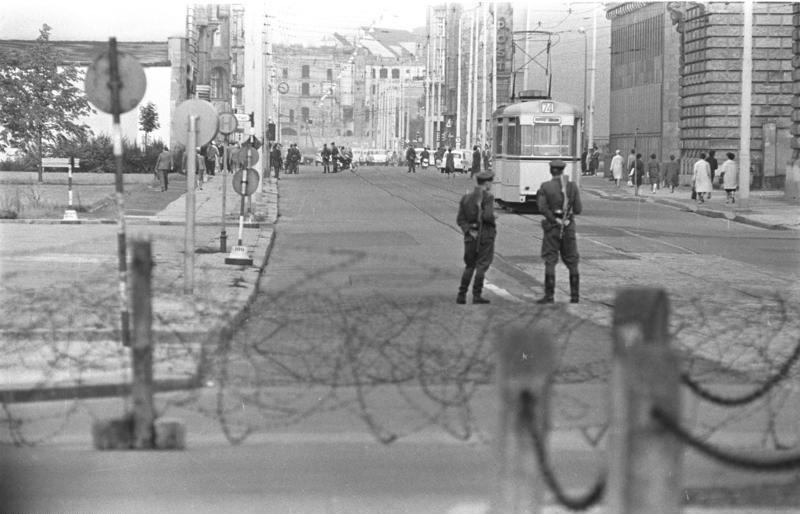 Berlin, Mauerbau Mauerbau in Berlin, August 1961